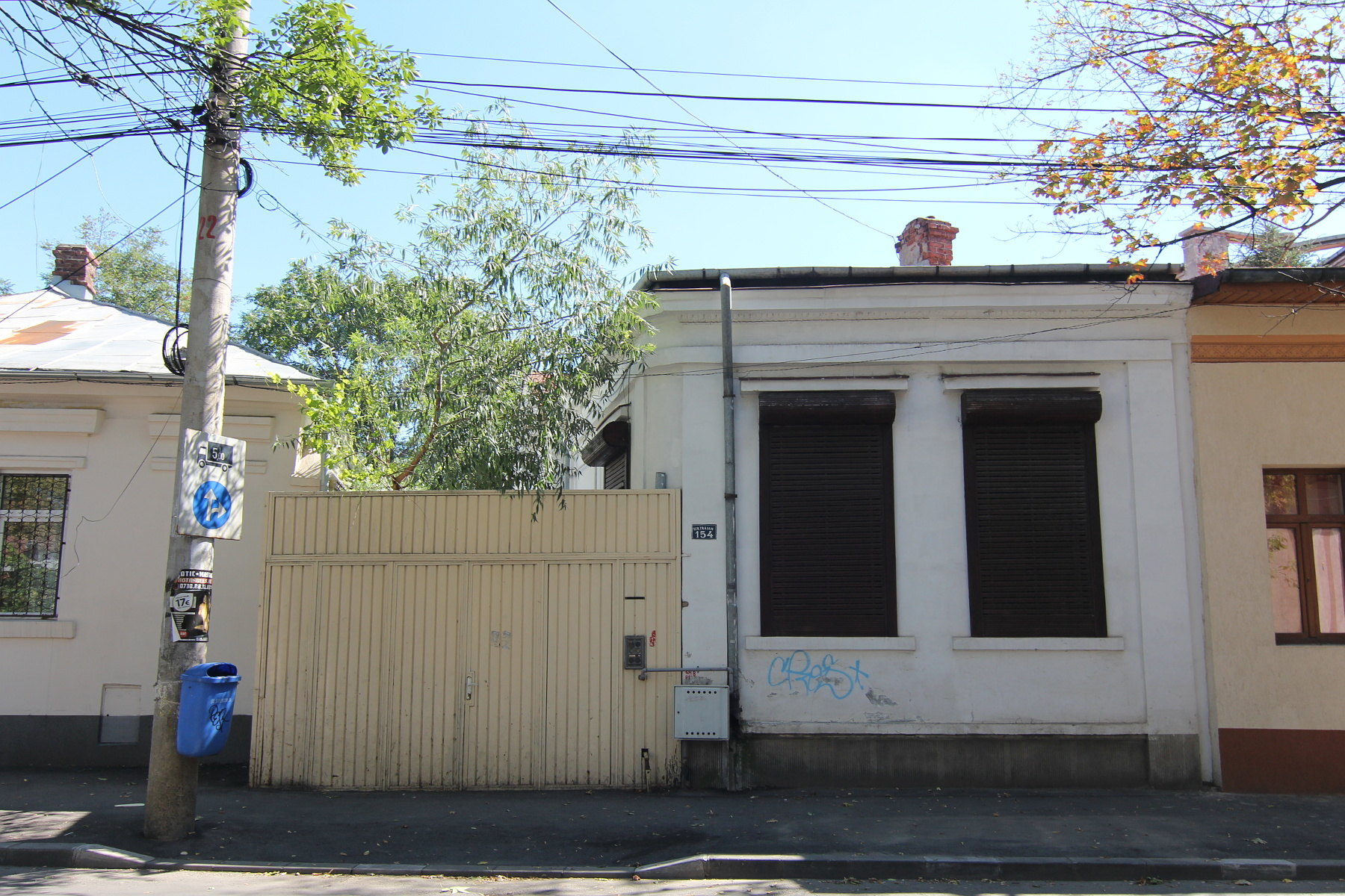 Casă pe strada Traian